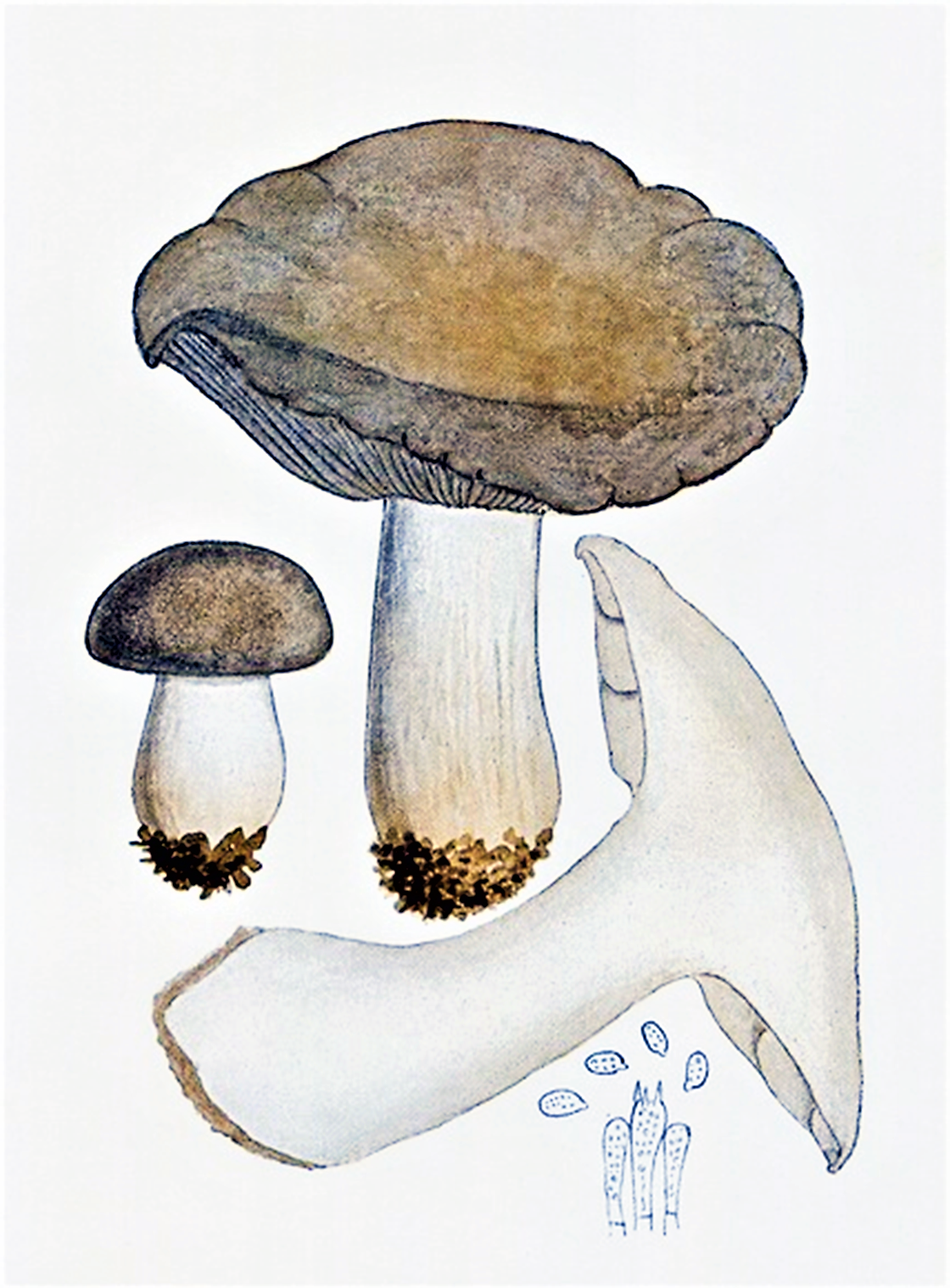 Giacomo Bresadola: Tricholoma graveolens (Fr.), heute Lepista graveolens (Peck) Dermek (1978)